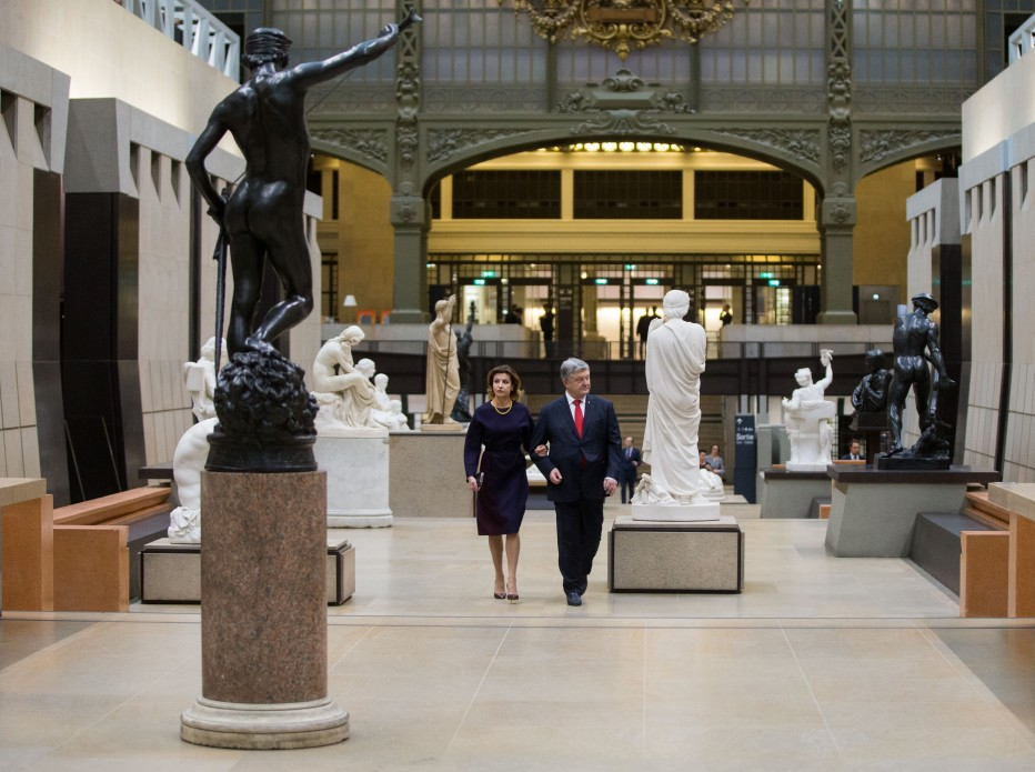 Petro Poroshenko and his wife at musée d'Orsay